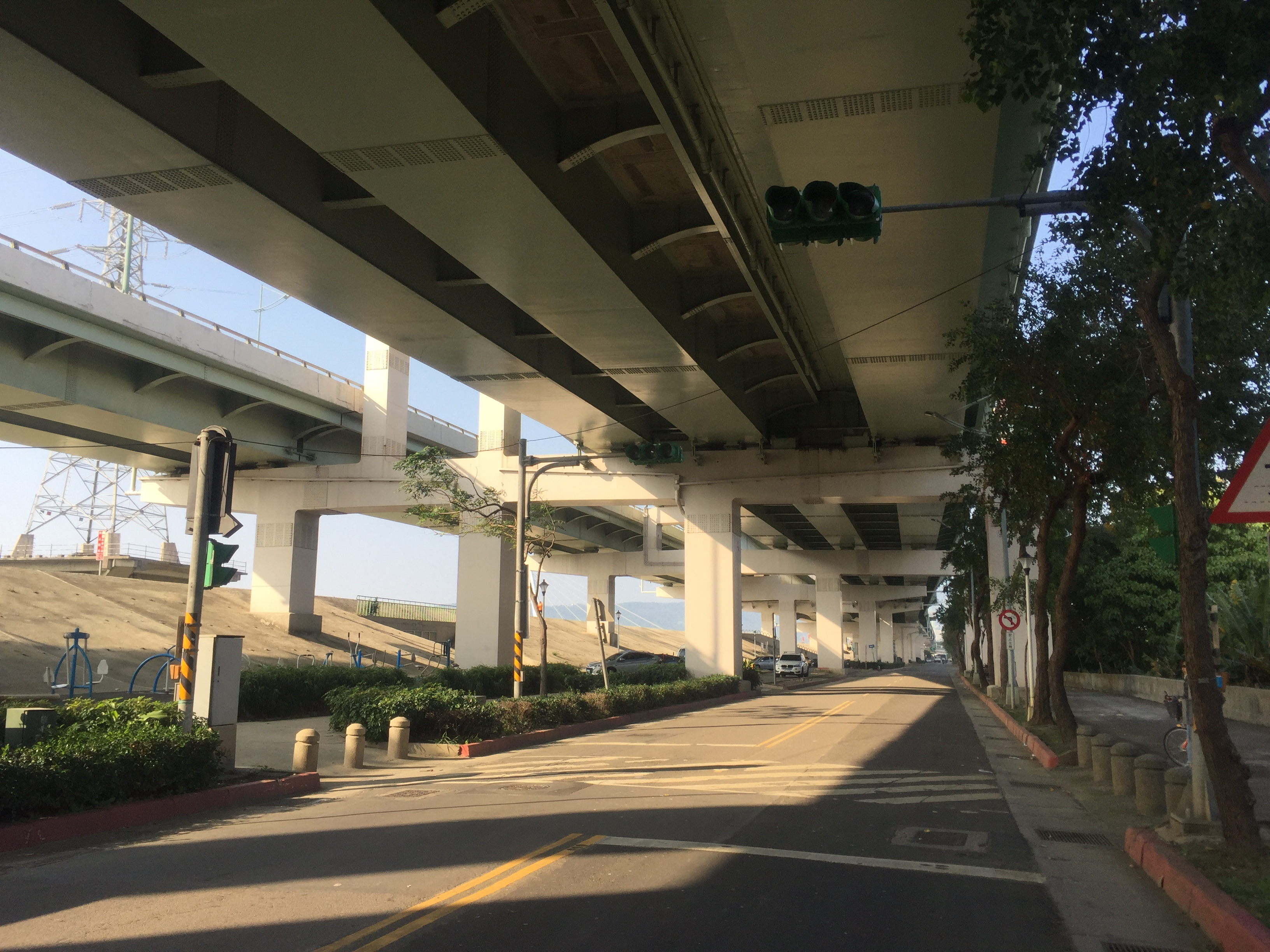 台北市北投區洲美快速道路下 洲美街